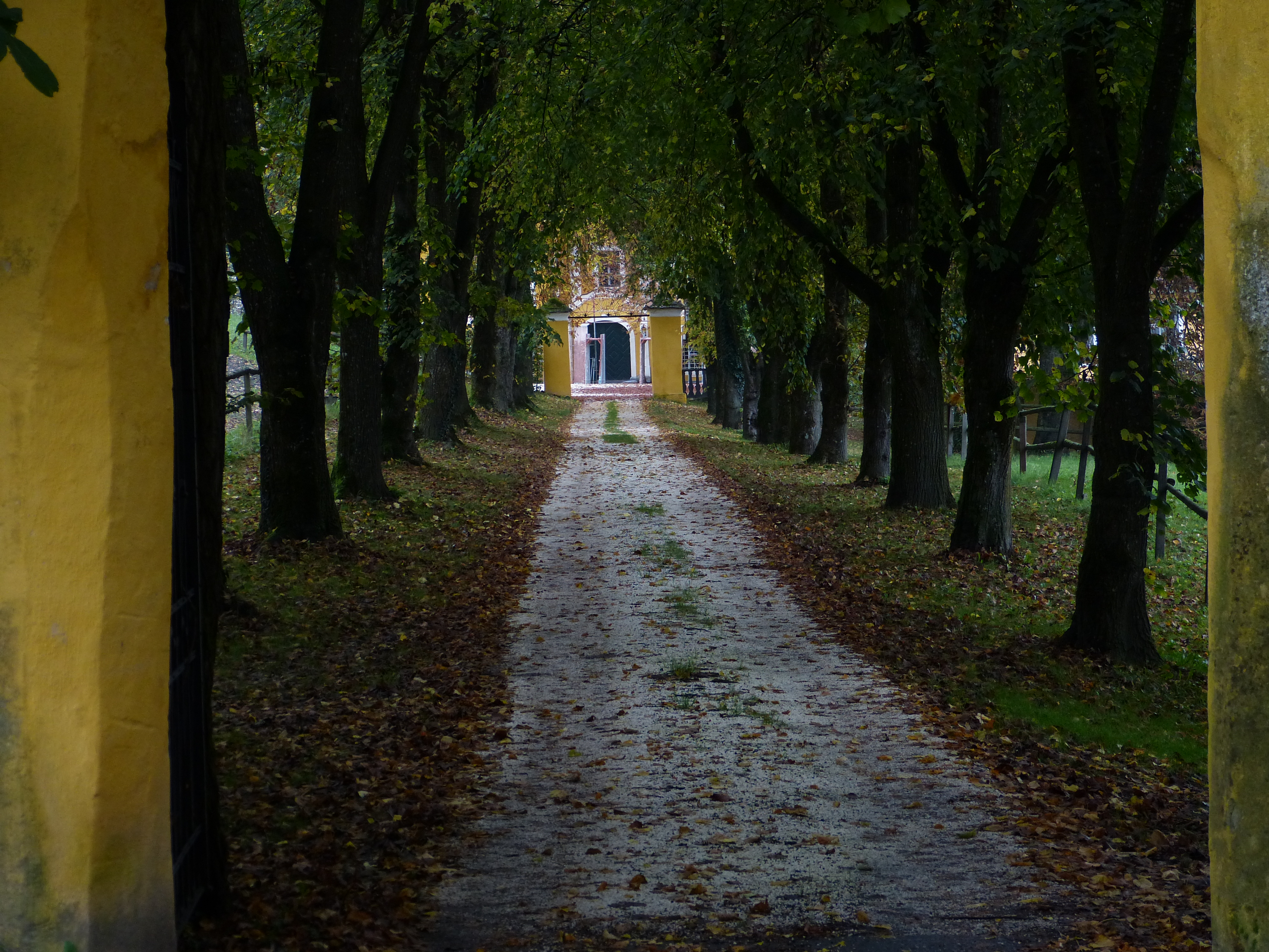 Allee zum Schloss Ottmanach, Gemeinde Magdalensberg